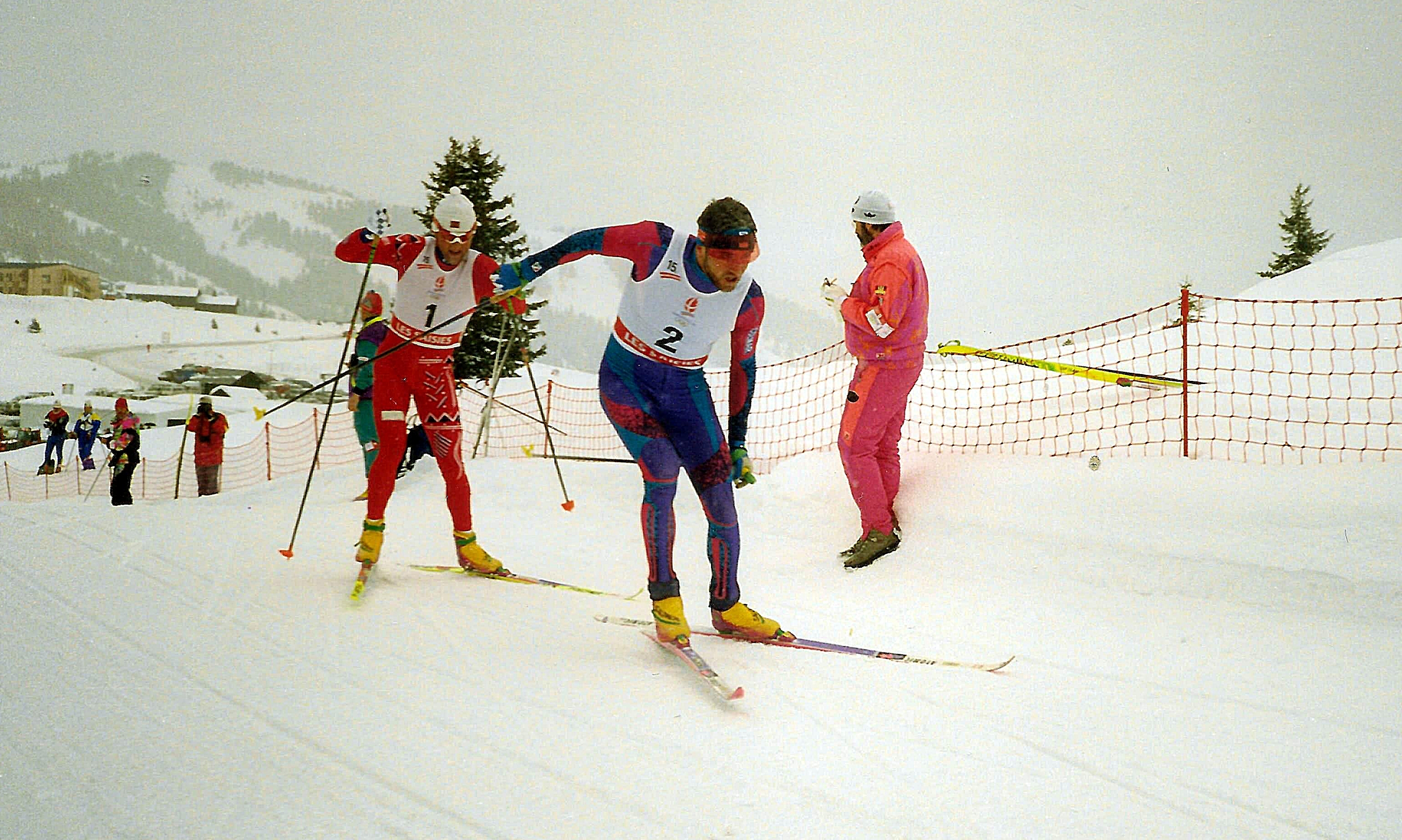 Marco Albarello (dossard 2) lors du 15 km poursuite hommes des J.O. d'Alberville, le 15 février 1992.